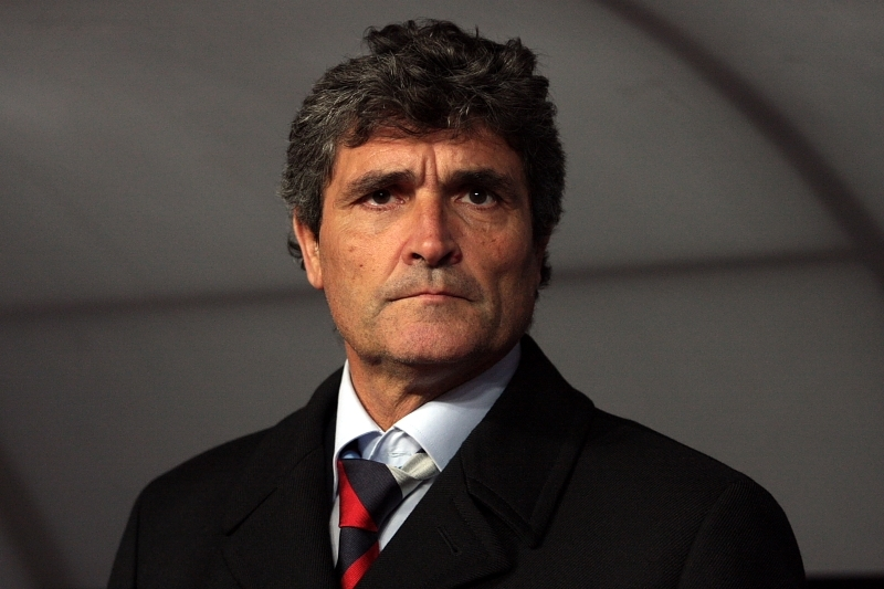 Juande Ramos, como entrenador del CSKA de Moscú.